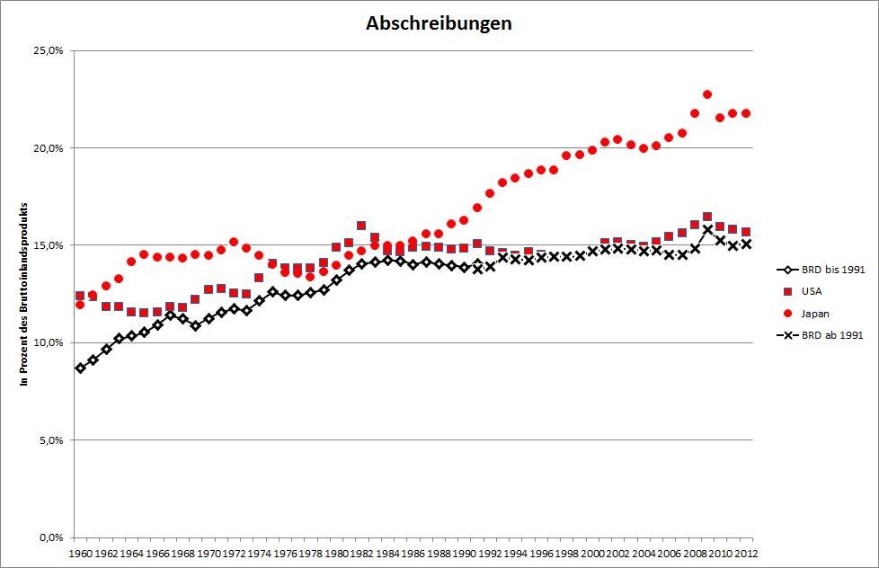 Abschreibungen (capital consumption) im Verhältnis zum BIP, 1960 bis 2004, USA, BRD und Japan